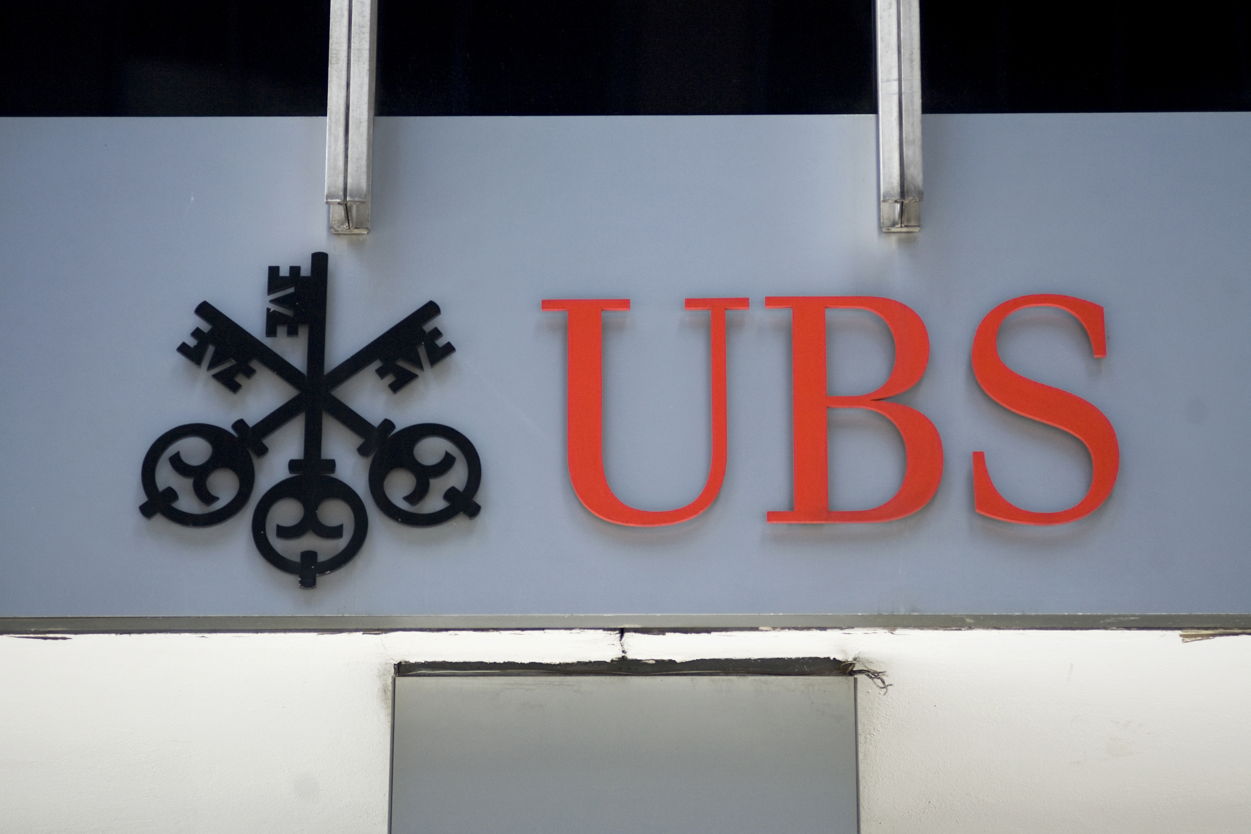 UBS Building, New York City นายกรัฐมนตรี เข้าร่วมการประชุมสมัชชาสหประชาชาติ สมัยสามัญ ครั้งที่ 64 และการประชุม Pittsburgh Summit ณ นครนิวยอร์ก สหรัฐอเมริกา ระหว่าง วันที่ 21-27กันยายน 2552 (The Official Site of The Prime Minister of Thailand Photo by พีรพัฒน์ วิมลรังครัตน์)